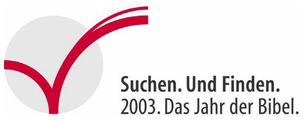 Seite ist seit 2001 online, seit dieser Zeit wird es wohl auch das Logo geben. Gemäß Angabe auf der Seite ist es gemeinfrei.